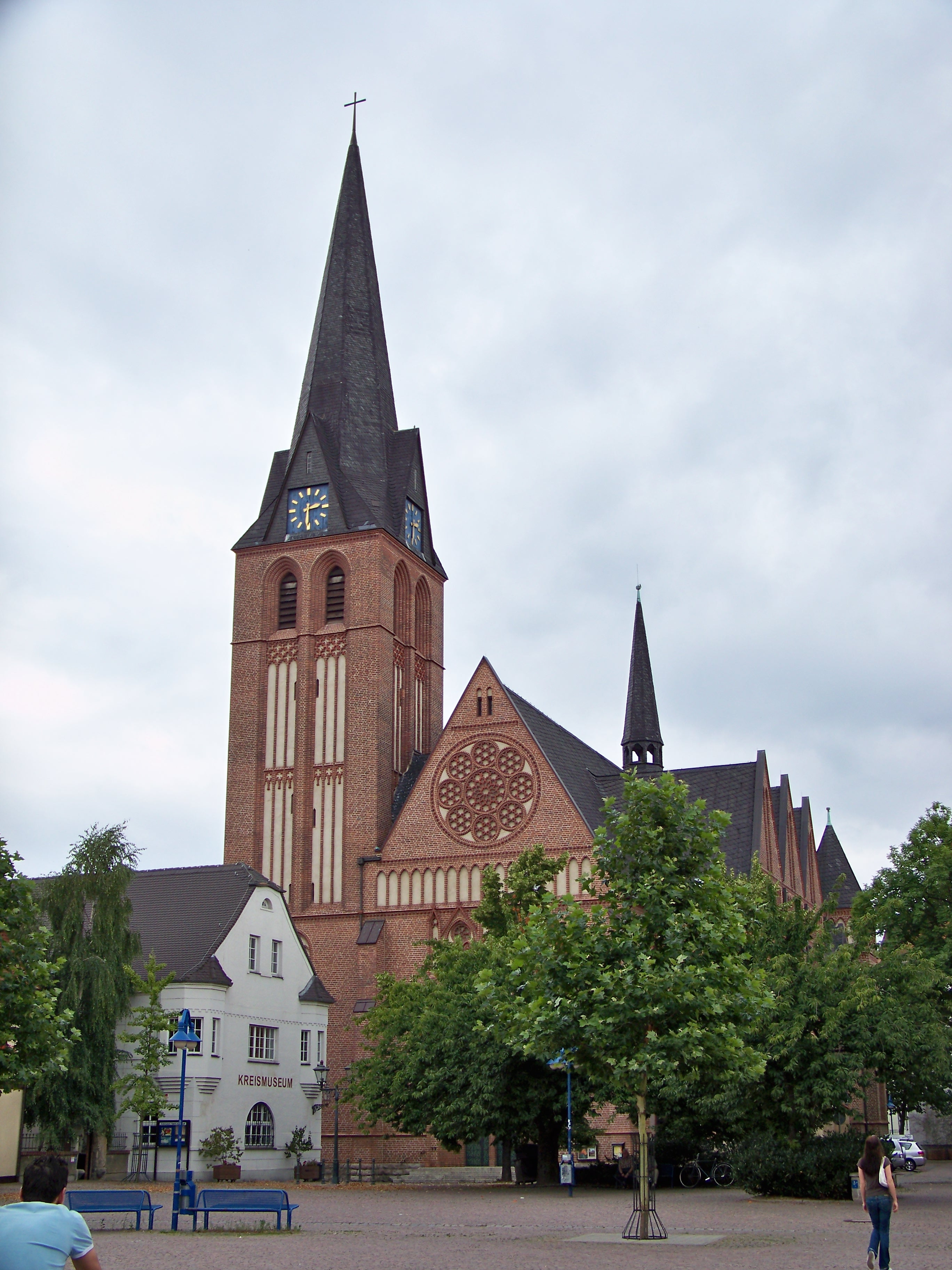 Kirche am Markt in Bitterfeld, links daneben das Heimatmuseum